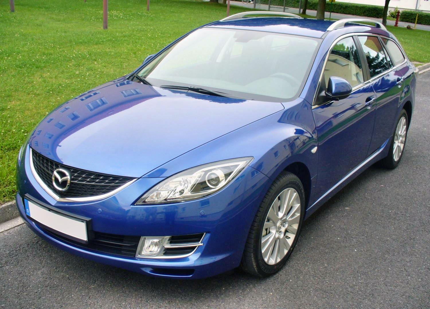 Mazda 6 GH Sport Kombi